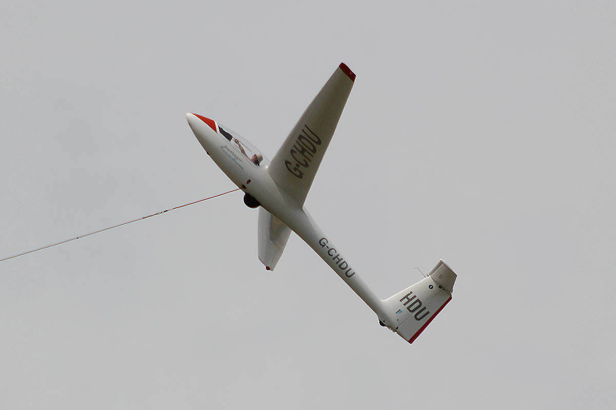 G-CHDU PZL-Bielsko SZD-51-1 Junior @ Gransden Lodge 08/07/2017